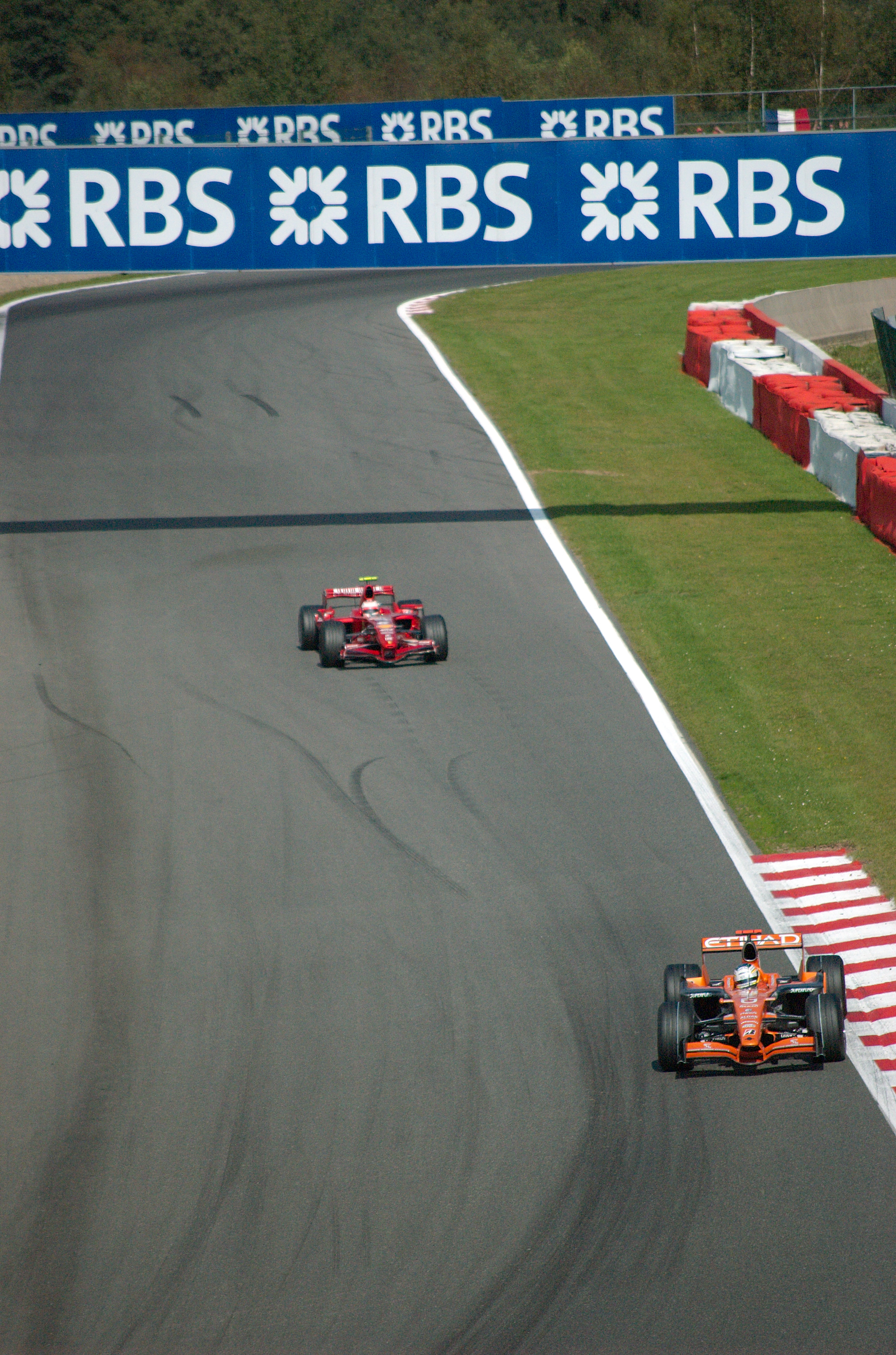 Ferrari & Spyker 2007 Spa, Belgian Grand Prix